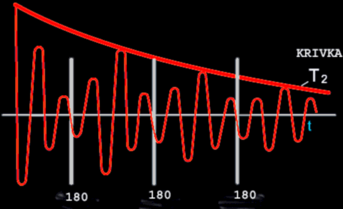 T2 krivka (sk)